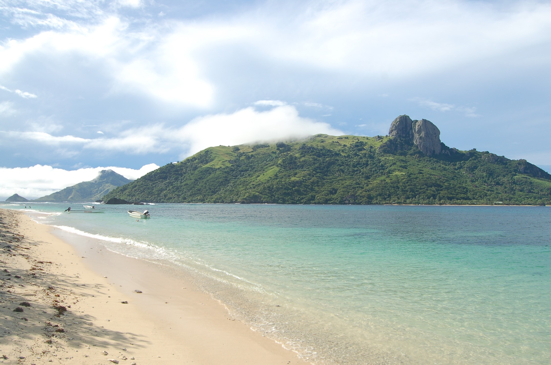 Blick auf Waya Lailai von Kuata